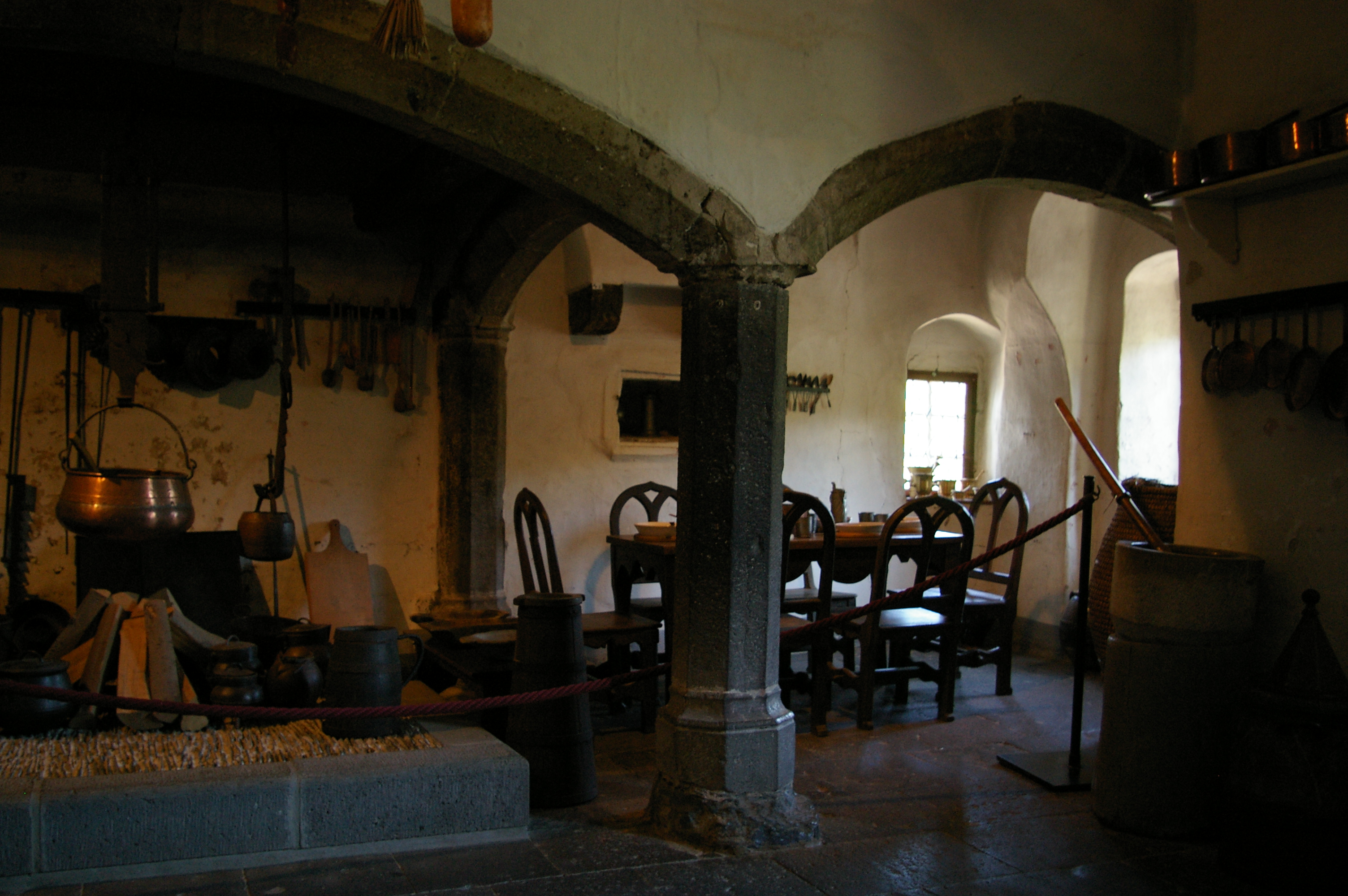 Le château d'Elzt